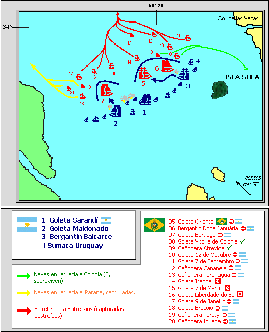 Batalla de Juncal, 09/02/1827, retirada brasileña